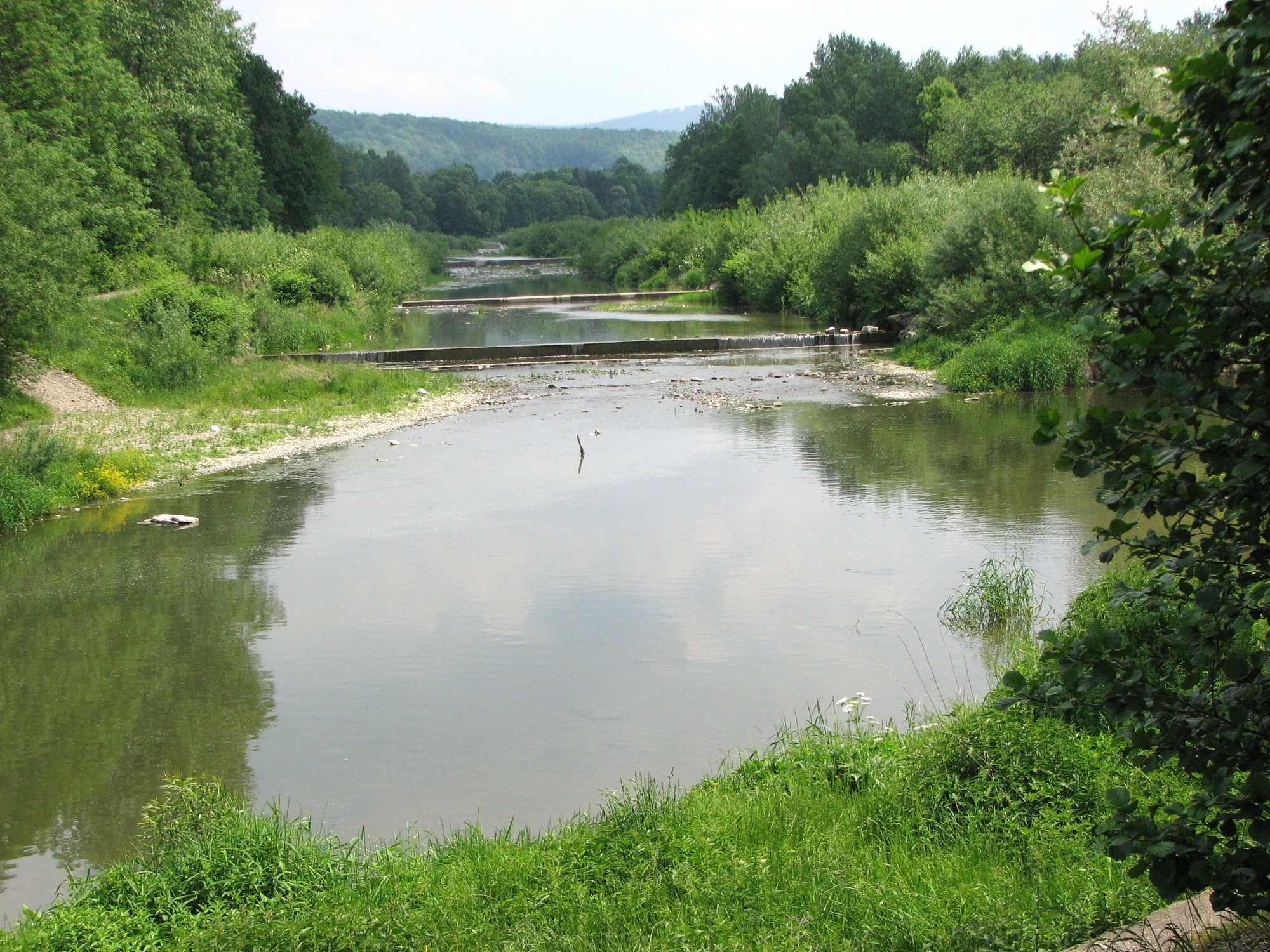 Ujście Brennicy do Wisły, widziane z lewego brzegu Wisły w Harbutowicach